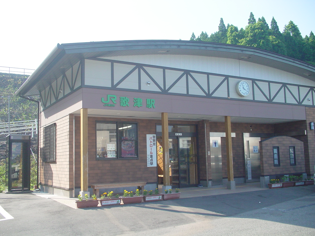 （歌津駅）